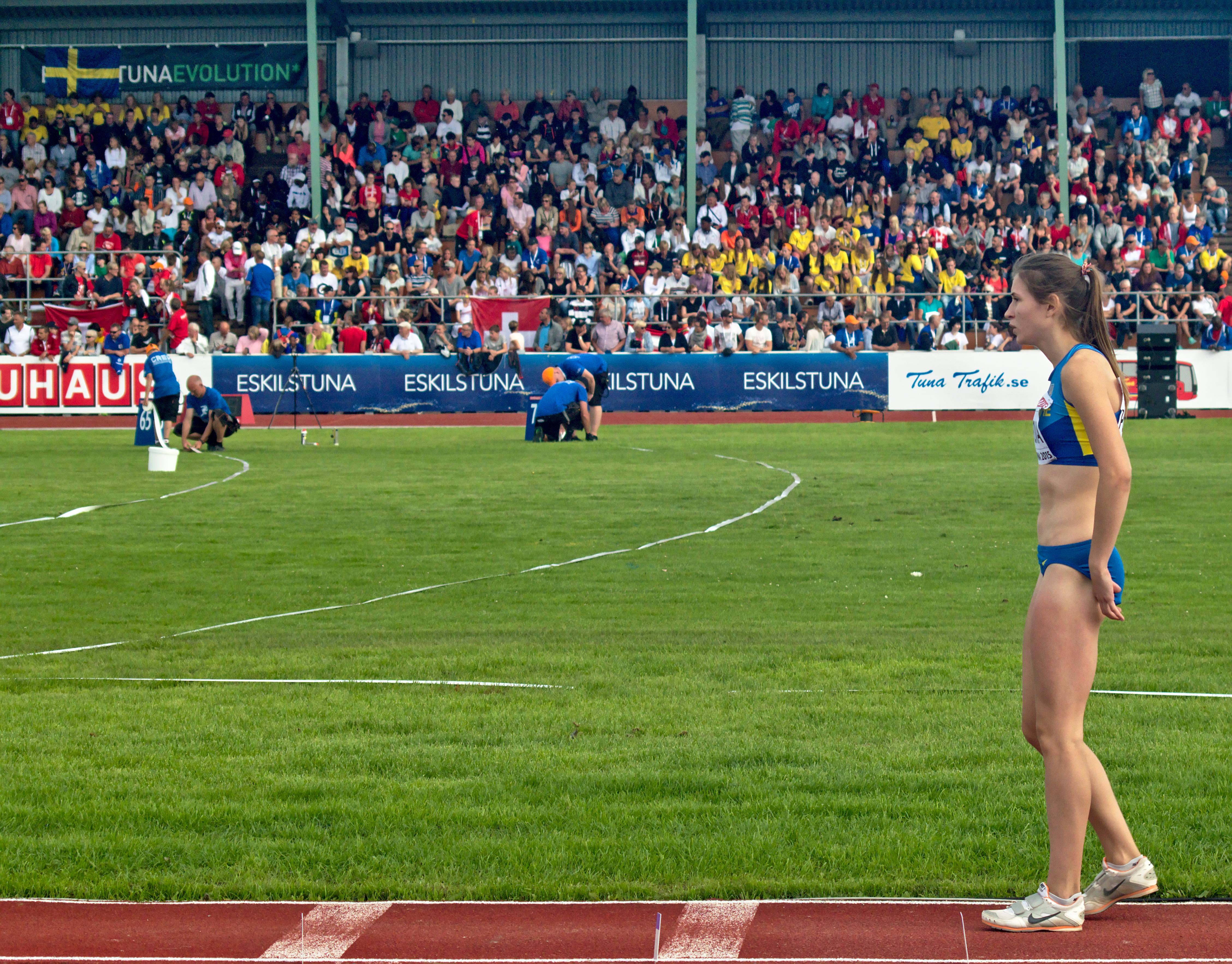 Tresteg vid Junioreuropamästerskapen i friidrott 2015, Kateryna Popova.